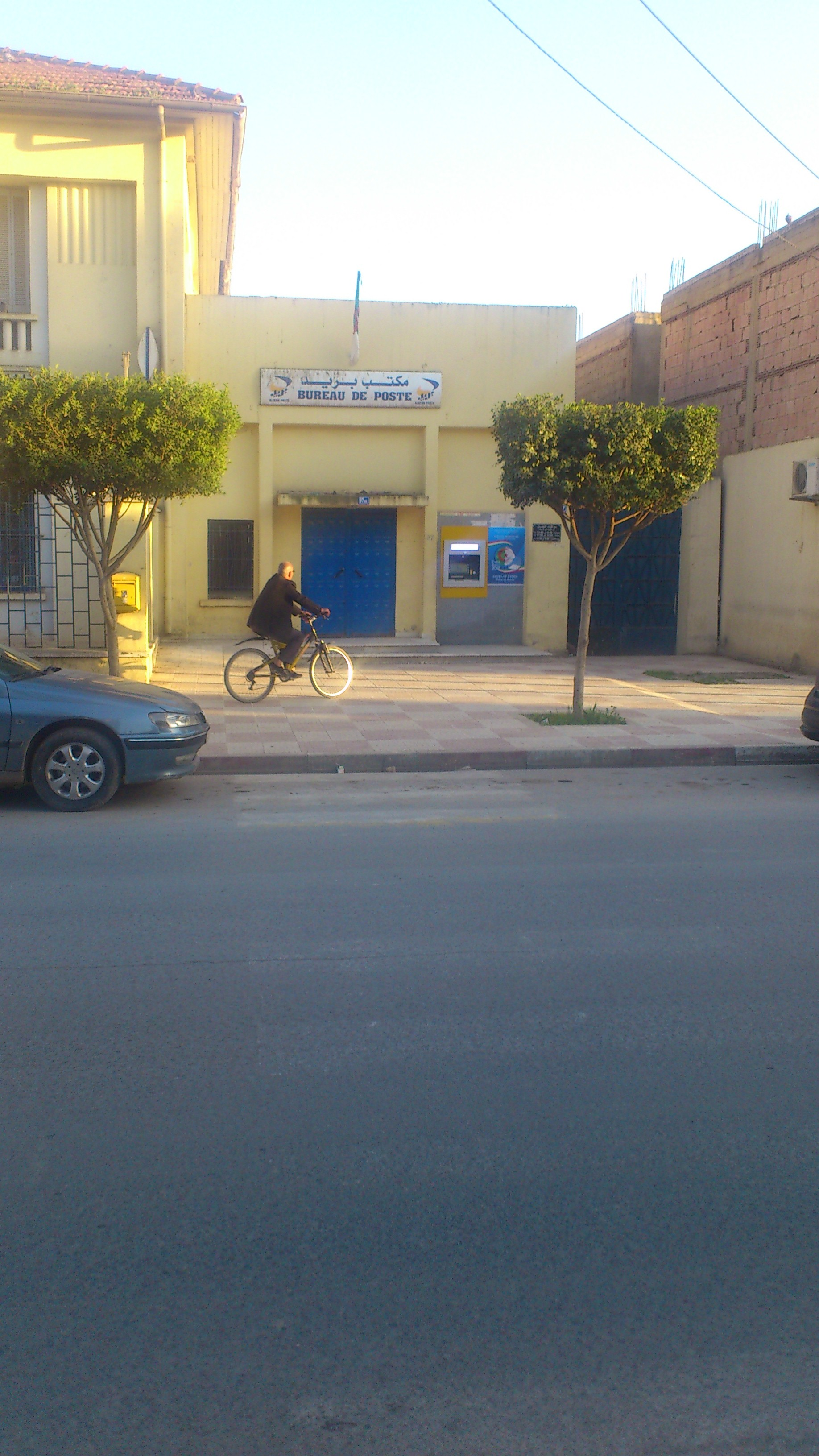 bureau de poste